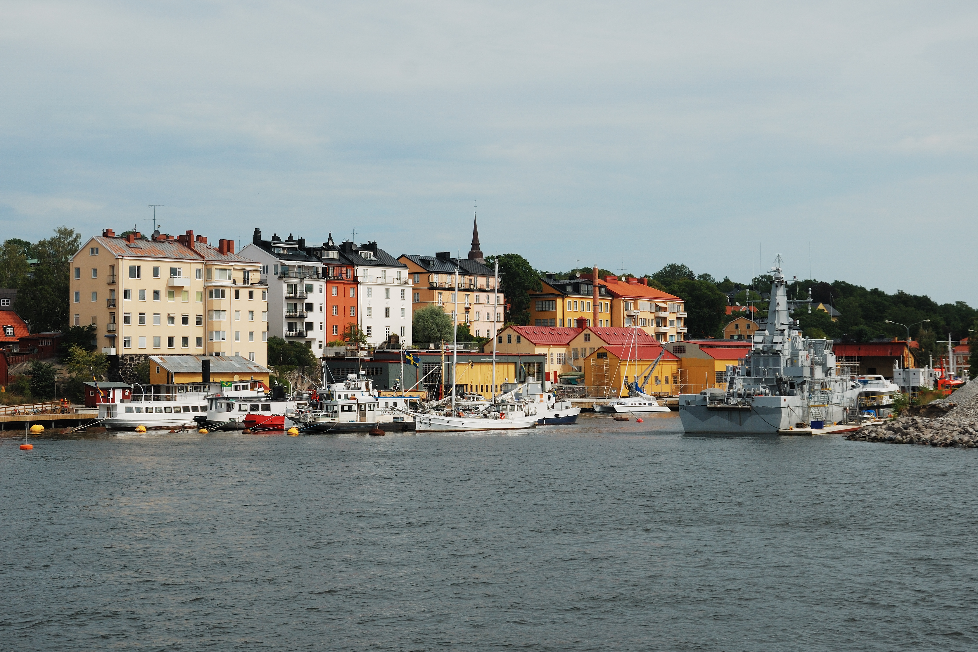 Djurgårdstaden och Djurgårdsvarvet, juli 2011.